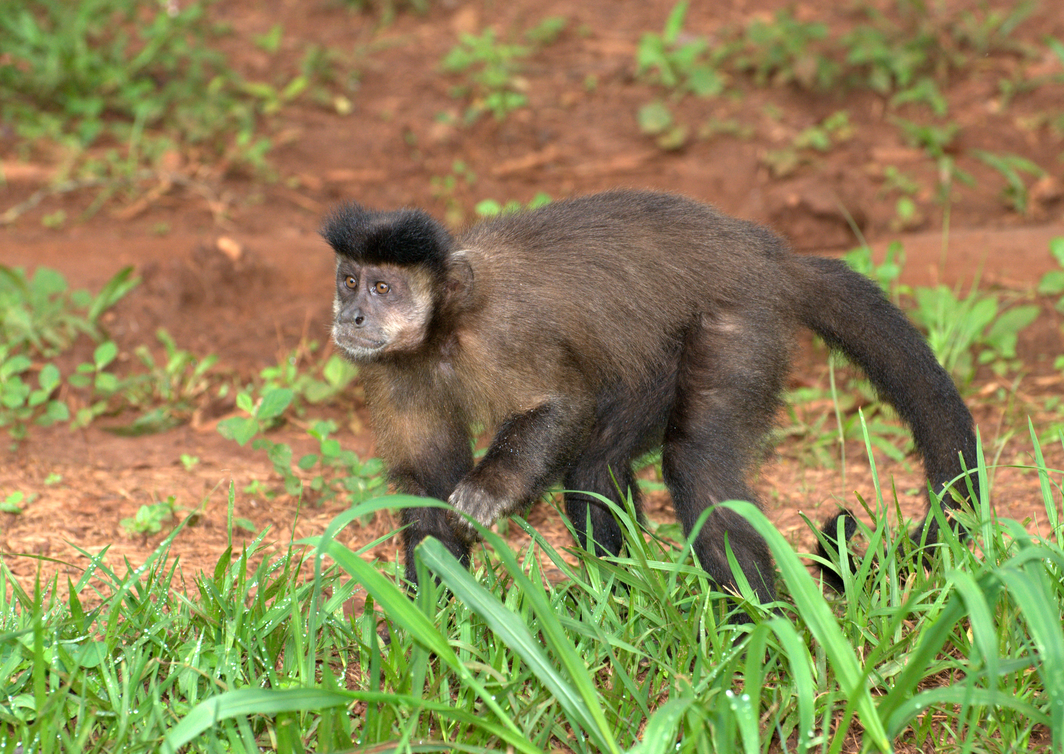 Reserva Ambiental - Piraju-SP - Brasil